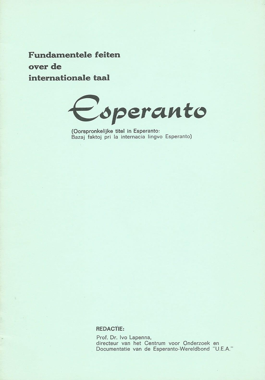 kaft van "Fundamentele feiten over de internationale taal Esperanto", 1965